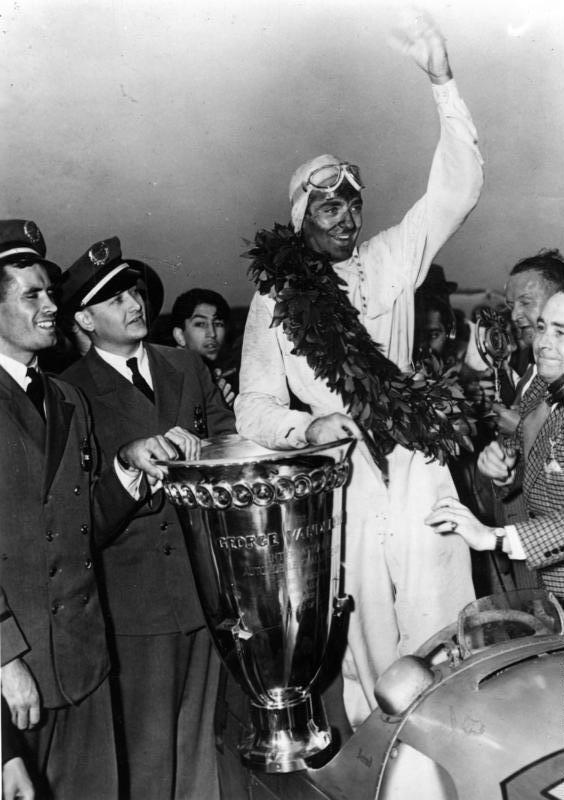 Bernd Rosemeyer mit Vanderbilt Cup Die ersten Original-Aufnahmen vom grössten Autorennen der Vereinigten Staaten. UBz: den Sieger im Vanderbilt-Rennen Ernst [Bernd] Rosemeyer mit dem Pokal. 12.7.1937 [Herausgabedatum] [New York.- Rennfahrer Bernd Rosemeyer mit Siegerpokal des Vanderbilt Cup am 5. Juli 1937] Abgebildete Personen: Rosemeyer, Bernd: Automobilrennfahrer, verheiratet mit Elli Beinhorn, Deutschland